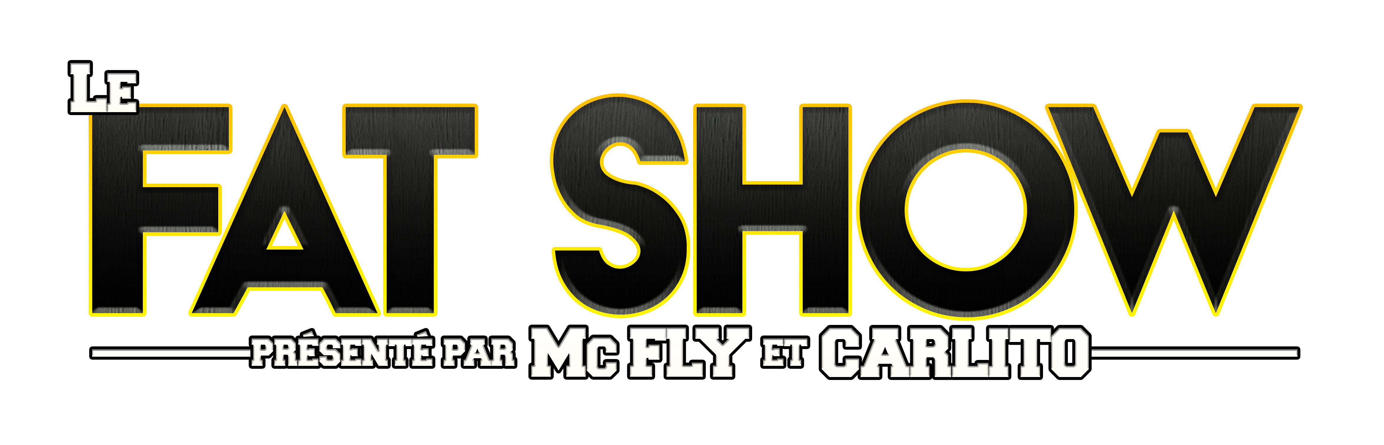 Nous pouvons voir le logo du Fat show qui presente l'émission